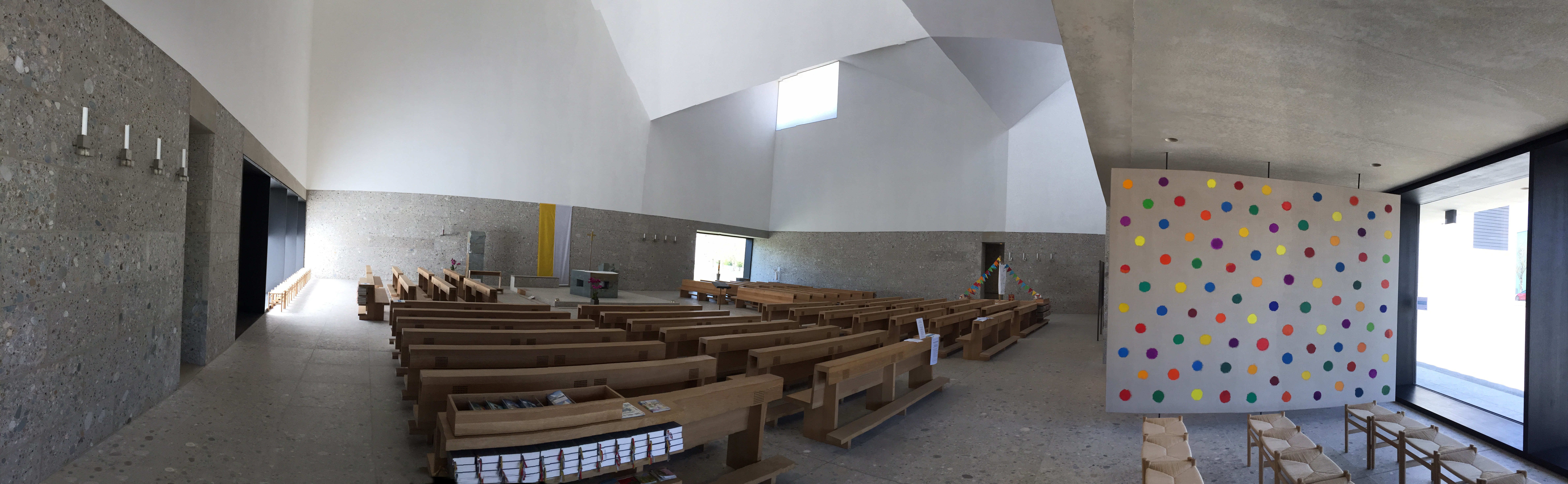 Kirche Poing Seliger Pater Rupert Mayer Panorama innen